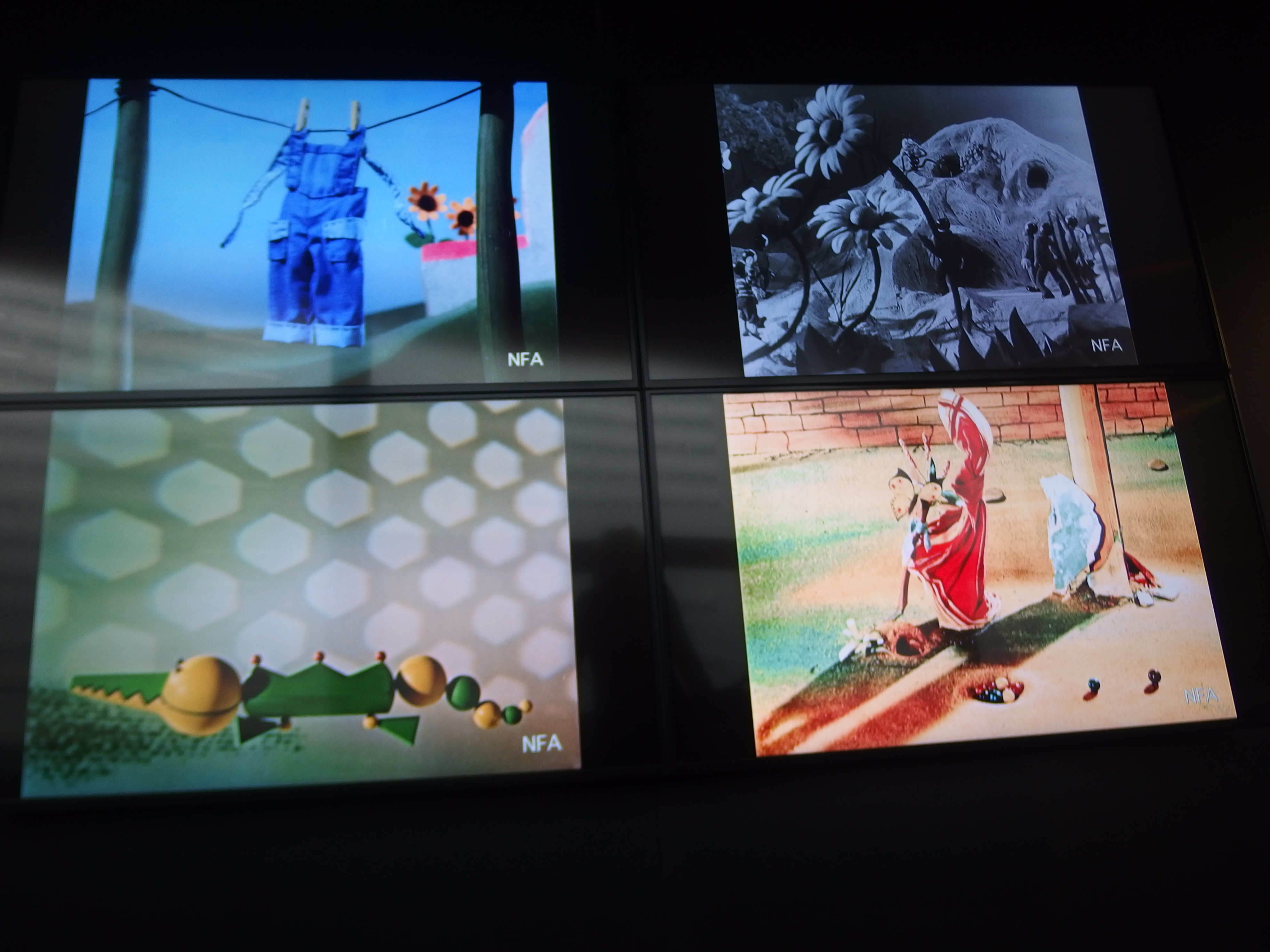 Filmový uzel Zlín, zábavní park, Filmová 689, Zlín-Kudlov.